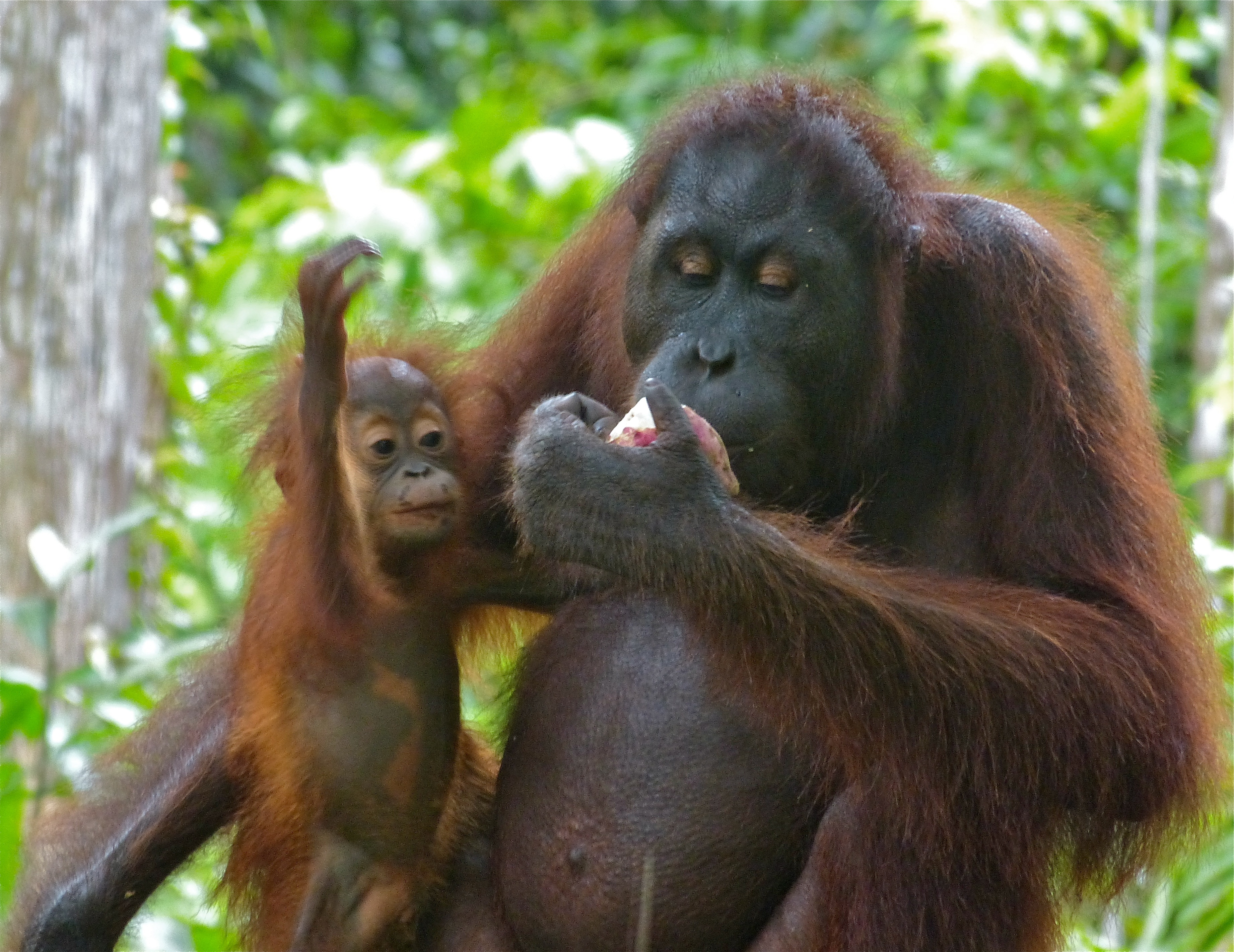 Orang Utan Rehabilitation Center, Sepilok, Sabah, MALAYSIA